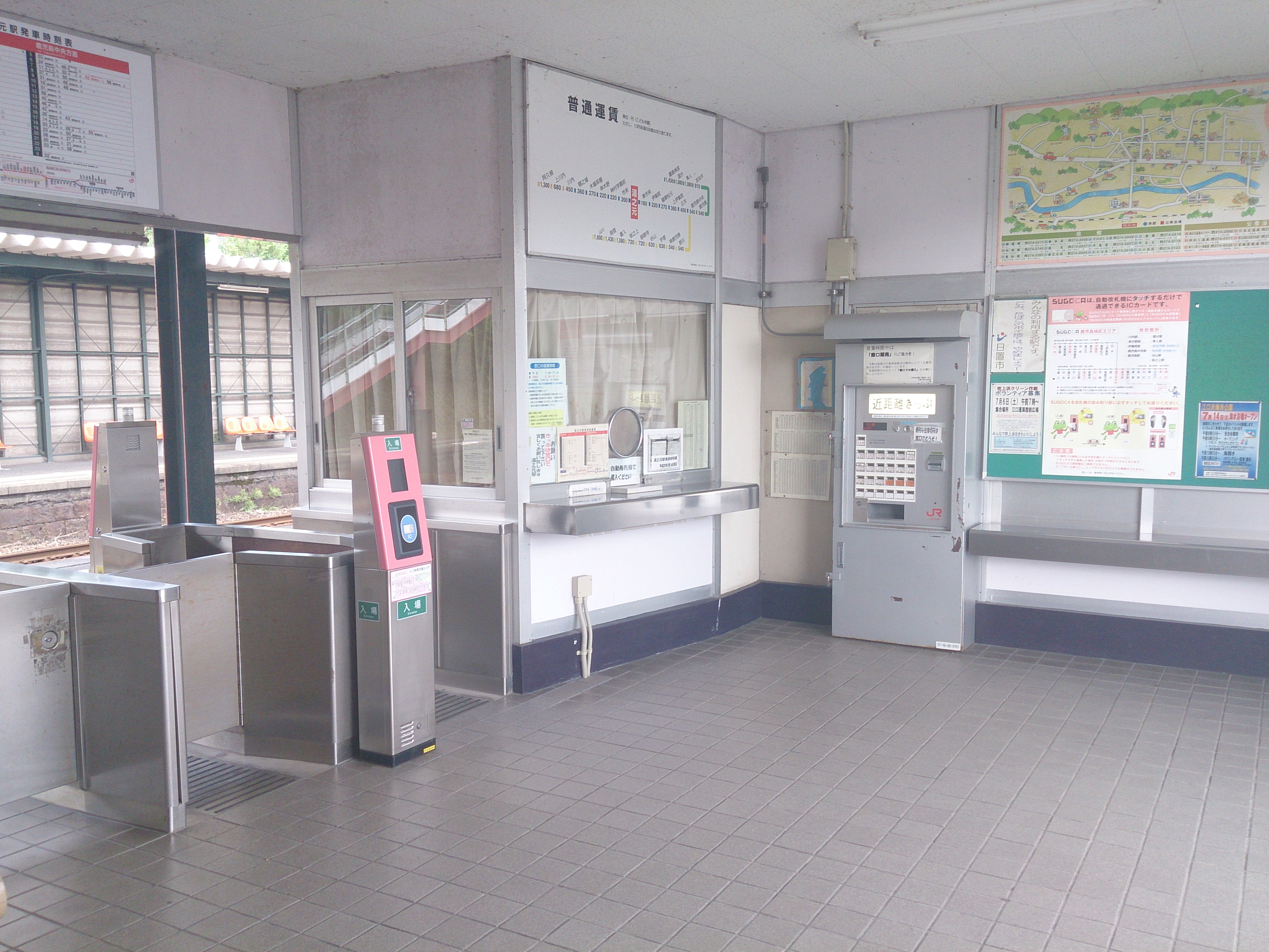 湯之元駅駅舎内